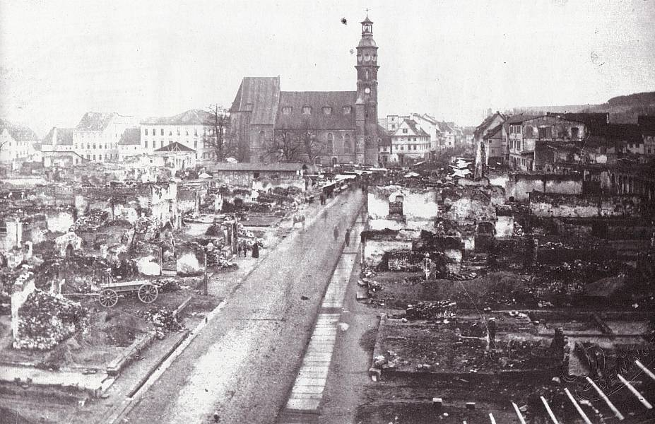 Vom Stadtbrand zerstörter Straßenzug in Meiningen